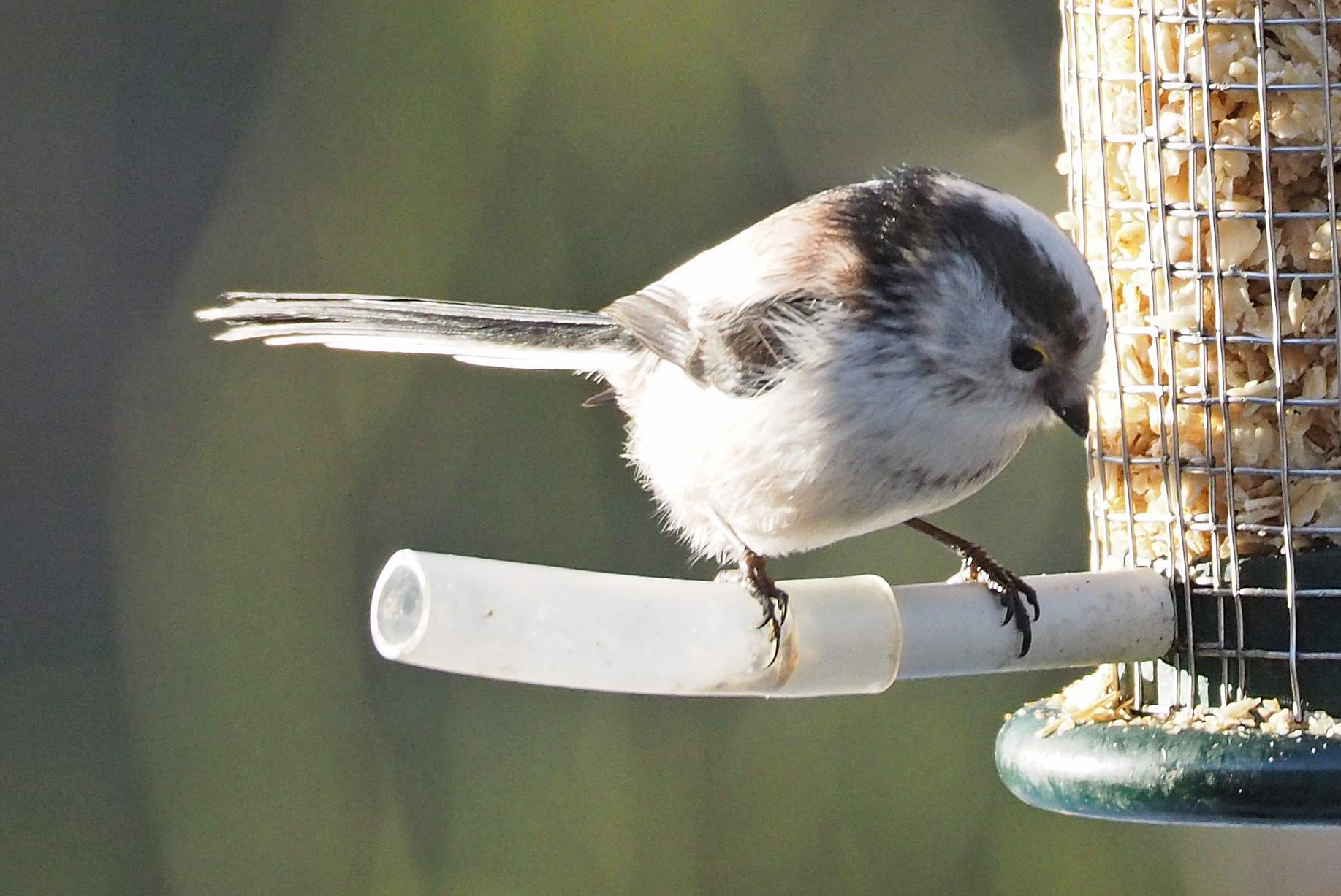 Schwanzmeise europaeus group (Aegithalos caudatus)